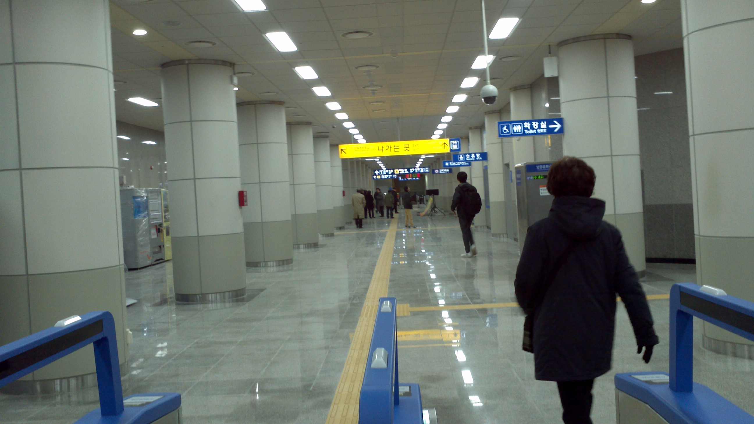 구성역 대합실